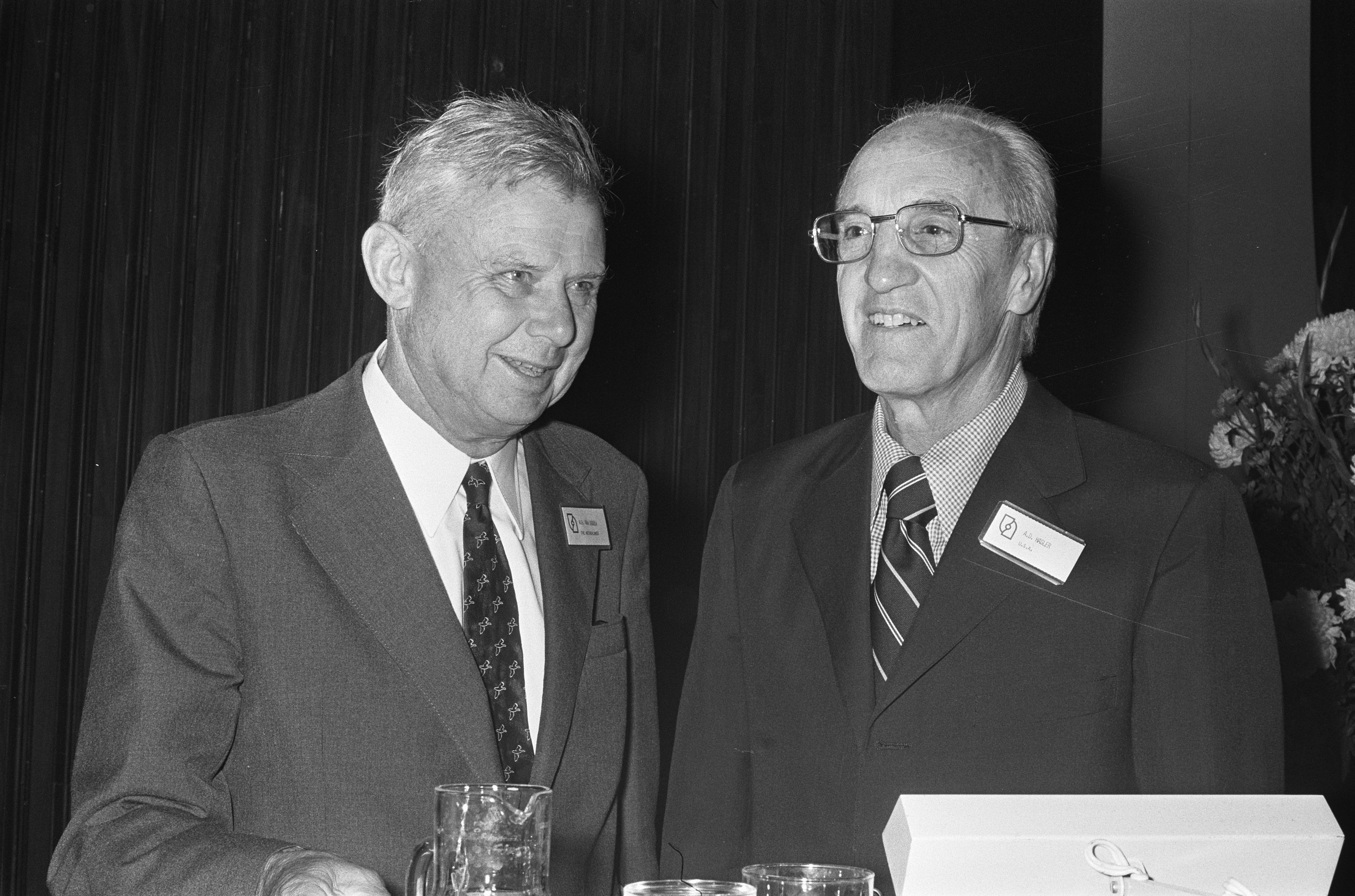 Ecologencongres in congrescentrum in Den Haag ; congresvoorzitter prof. Van Dobben met prof. Hasler (voorzitter van de Intecol, VS)